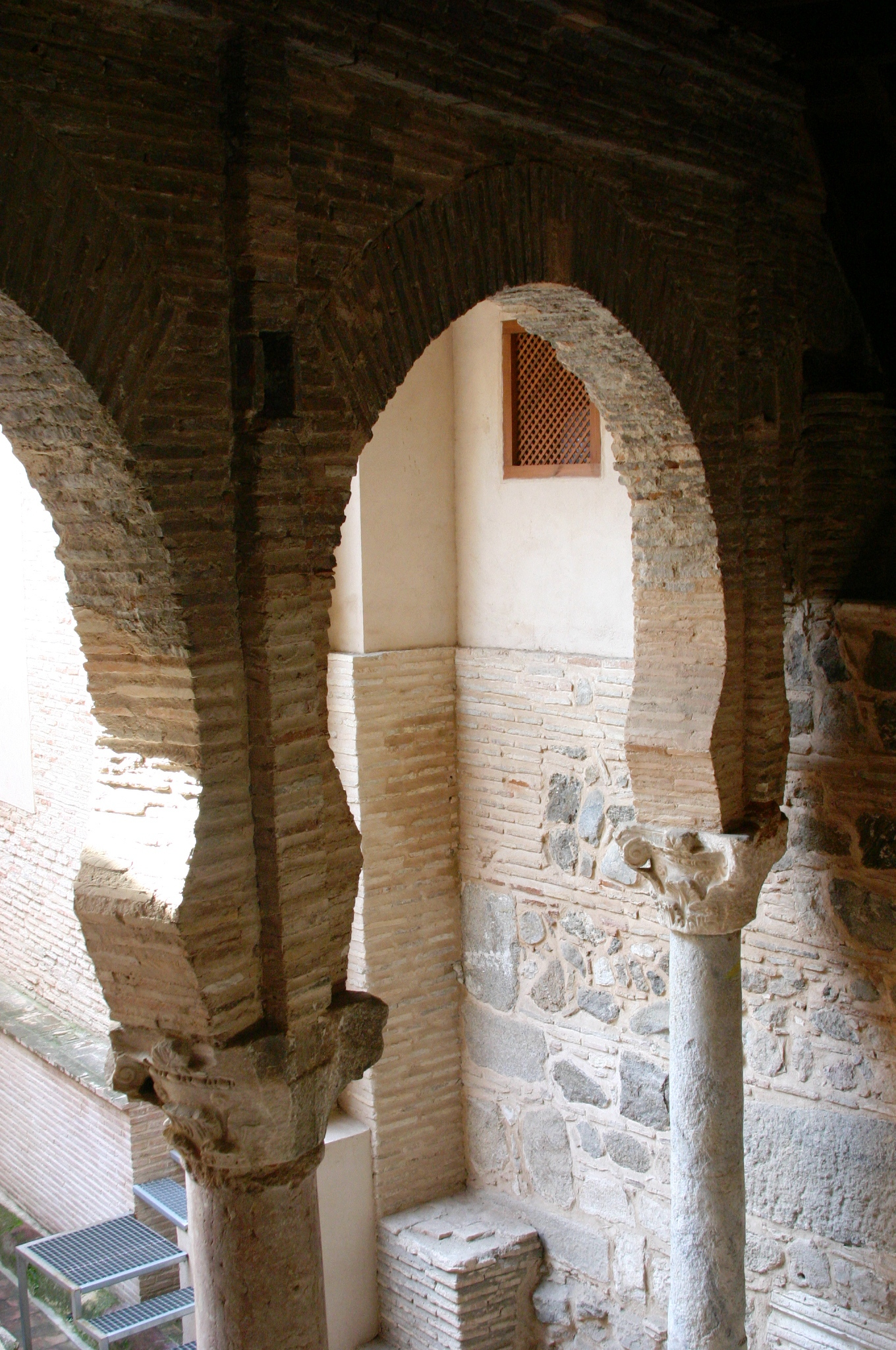 Iglesia del Salvador